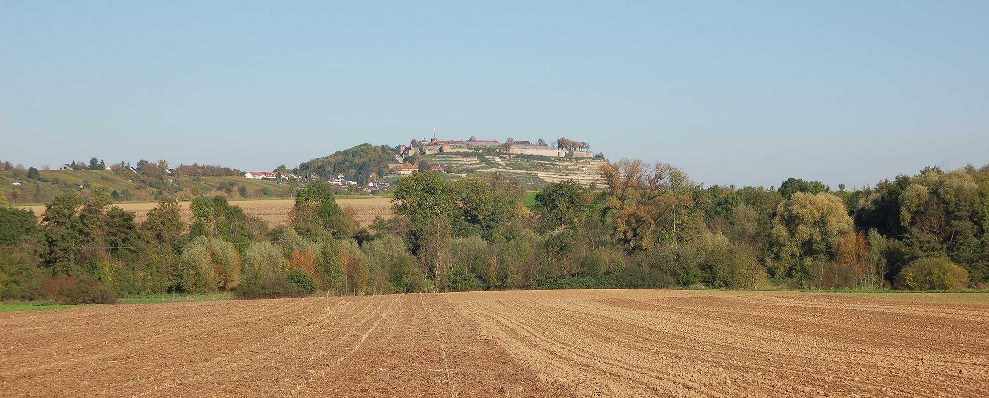 Talmulde des oberen Leudelsbachtals mit dem Hohenasperg